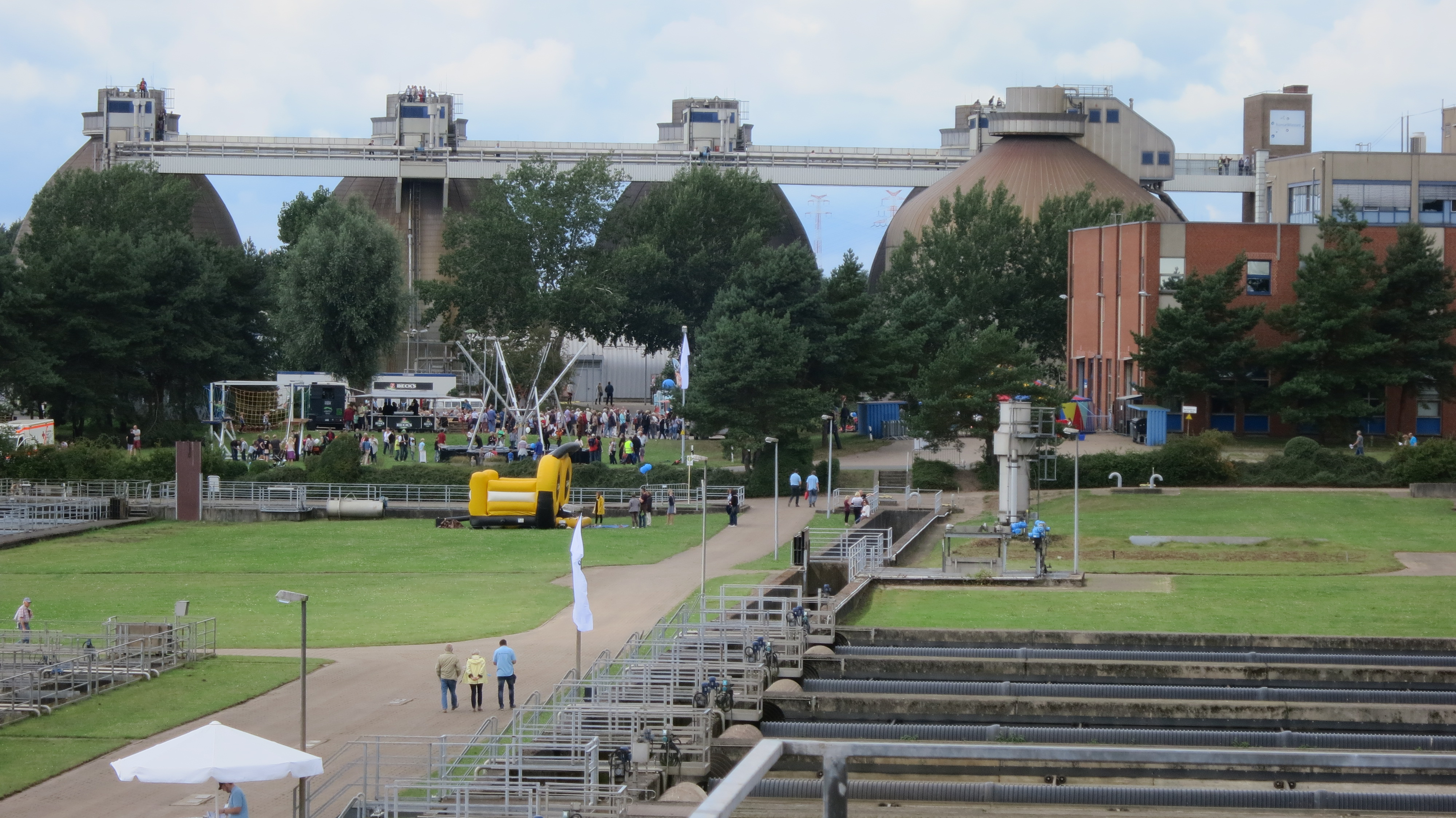 Faultürme